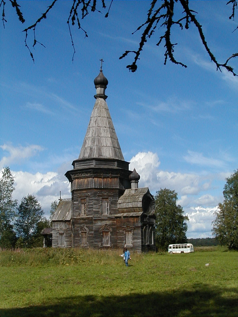 Церковь Сретенско-Михайловская (Архангельская область, Каргополь, село Красная Ляга (село Шеино))